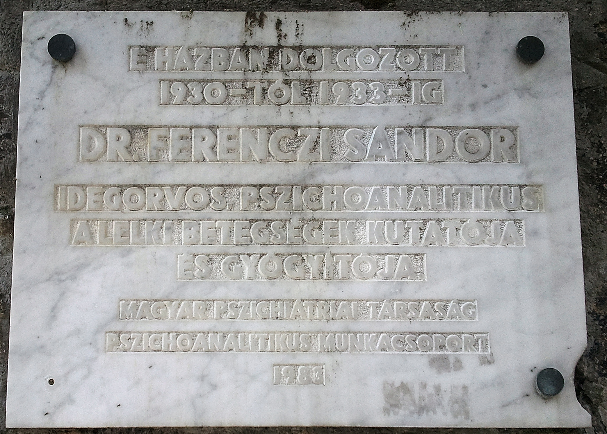 Ferenci Sándor emléktáblája Budapest I. kerület Lisznyai utca 11.